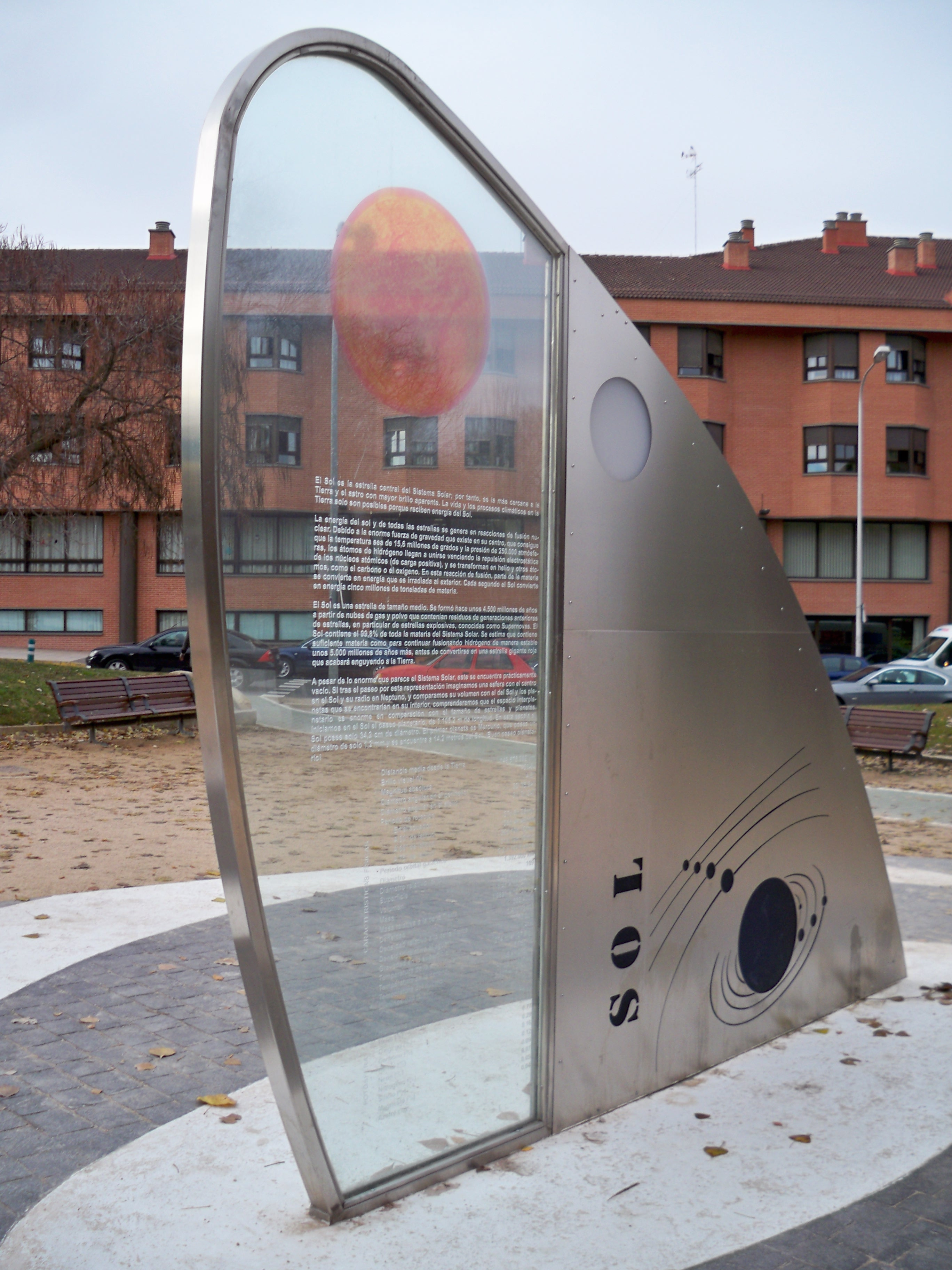 Representación a escala del sistema solar situada en el Parque lineal de la ciudad de Albacete